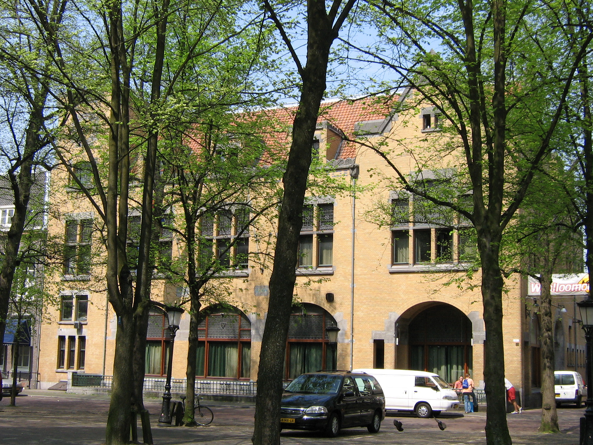 Janskerkhof 14, Utrecht, NL: Sociëteit Utrechtsch Studenten Corps. A.H. Zinsmeister, 1901.